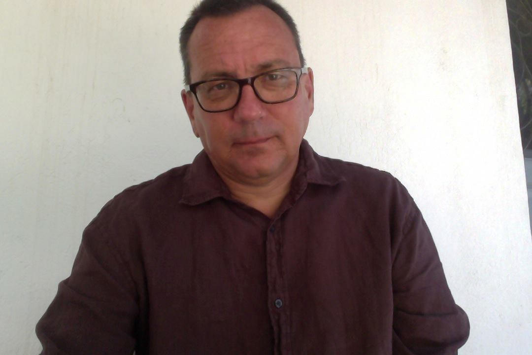 Photo de Jérôme Leroy (écrivain)